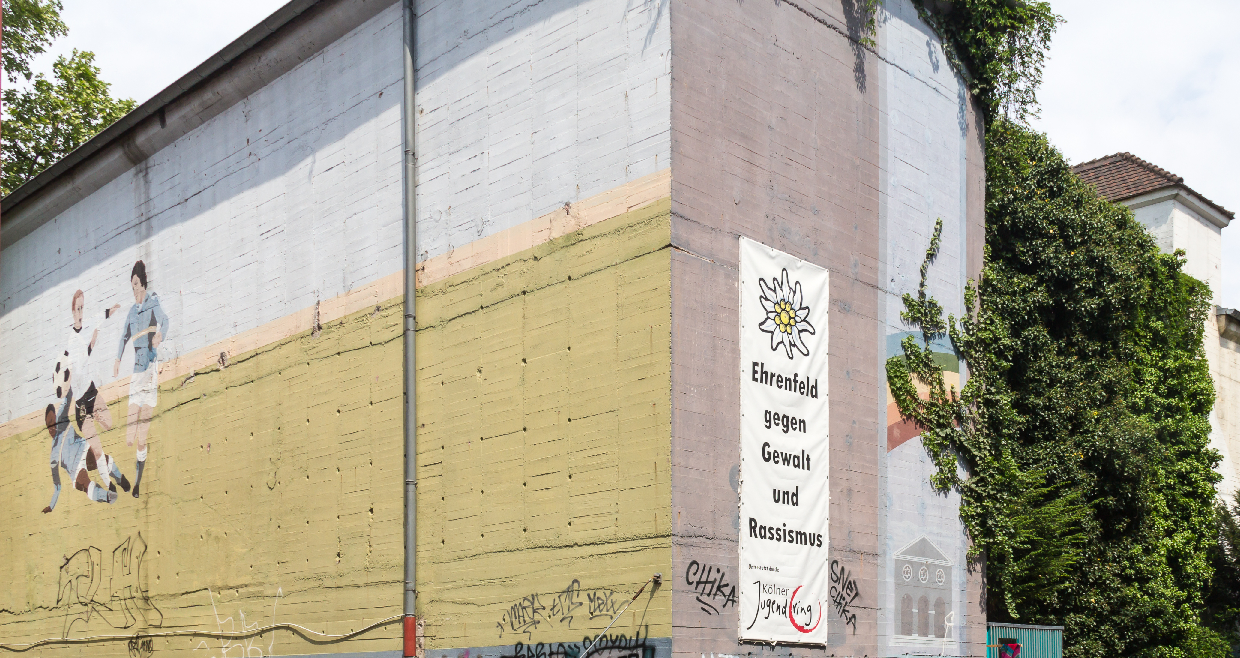 Denkmalgeschützter Hochbunker Körnerstraße, Köln-Ehrenfeld